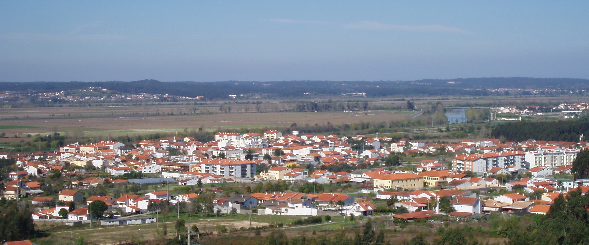 Granja do Ulmeiro com o vale do Baixo Mondego em segundo plano